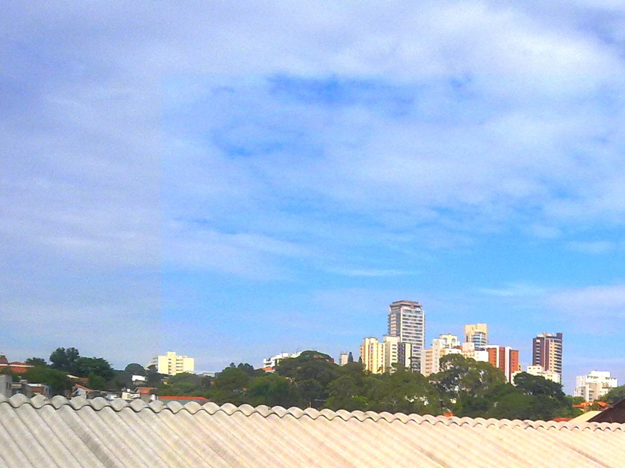 Visão da região do Alto da Lapa, zona oeste paulistana